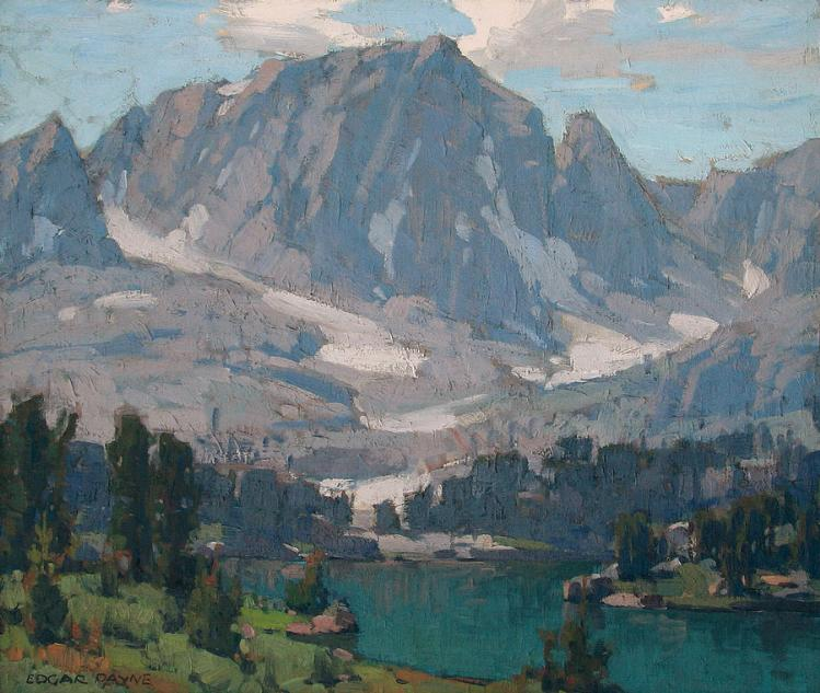 Картины Эдгара Пейна (англ. Edgar Alwin Payne; 1883—1947) — американского художника-импрессиониста